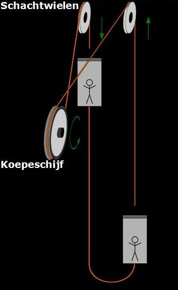 Schema van het Koepesysteem, eigen werk met als basis Treibscheiben-Förderung.svg, vrijgegeven op Commons